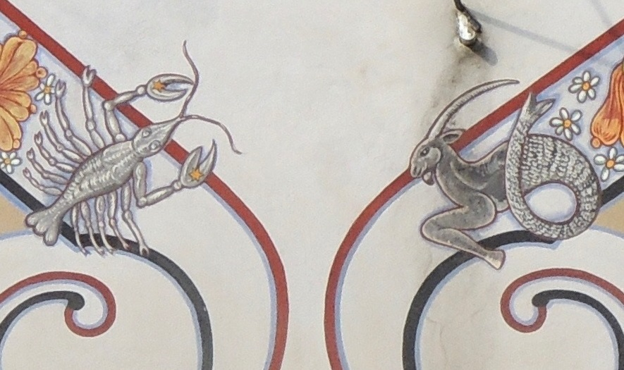 Cadran solaire de Rouffach, détail